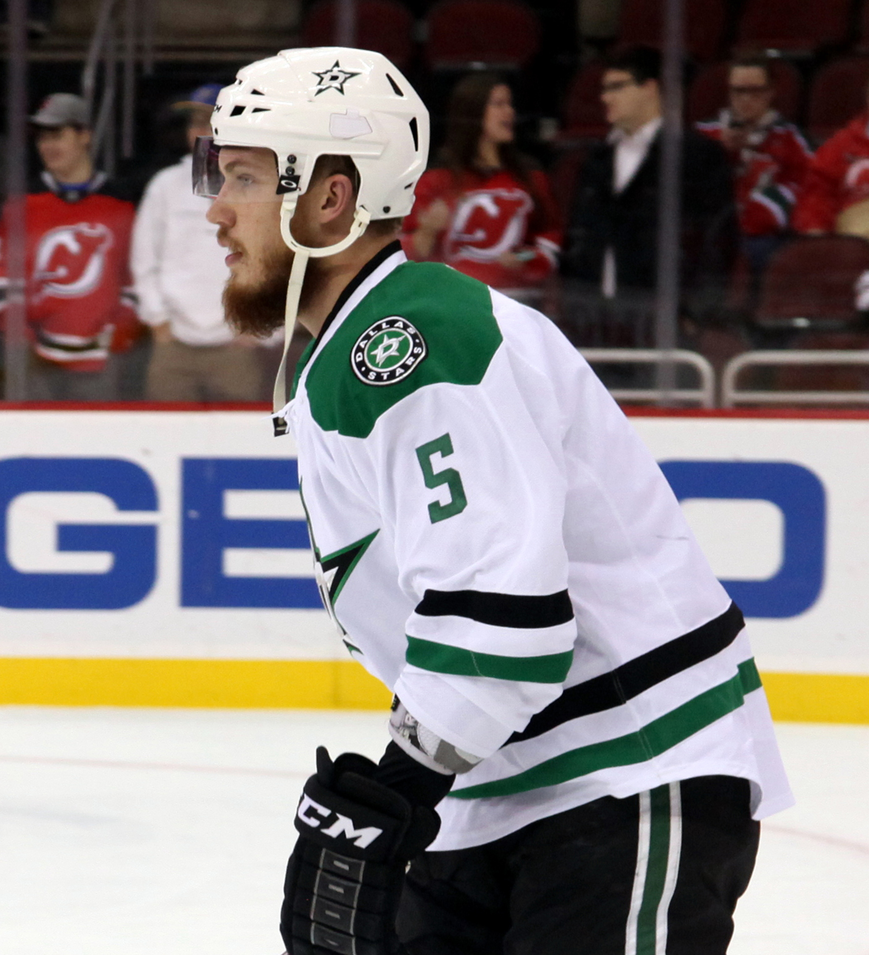 Oleksiak in October 2014.